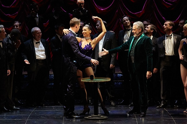 LE TIMBRE D'ARGENT Drame lyrique en quatre actes de Camille Saint-Saëns. Livret de Jules Barbier et Michel Carré. Créé en 1877 au Théâtre National Lyrique de Paris. Dernière version créée en 1914 à La Monnaie de Bruxelles. Production 2017 Opéra Comique Photo: Pierre Grosbois ( Direction musicale François-Xavier Roth Mise en scène Guillaume Vincent Avec Raphaëlle Delaunay, Edgaras Montvidas, Hélène Guilmette, Tassis Christoyannis, Yu Shao, Jodie Devos Chœur accentus Orchestre Les Siècles